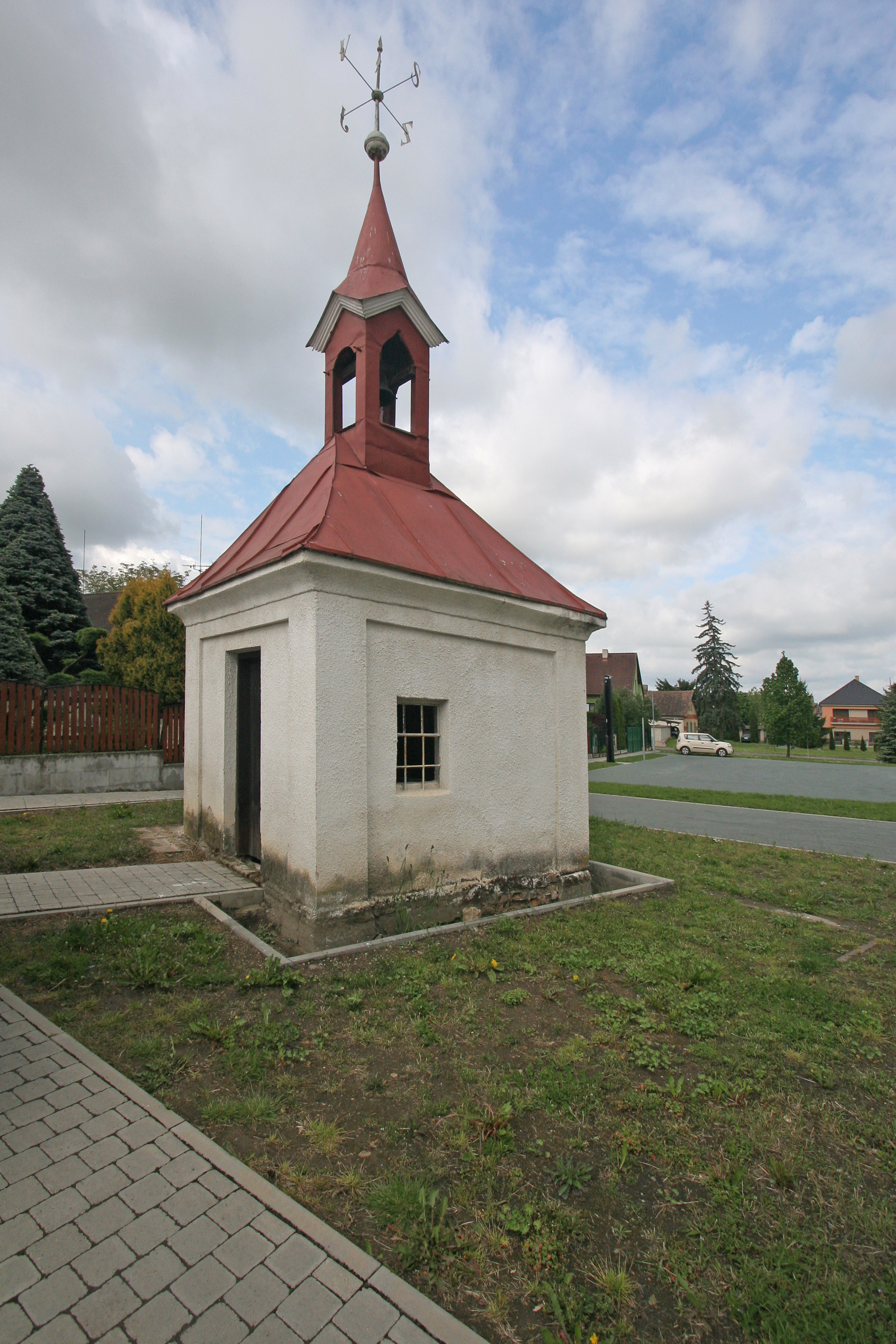 Staré Jesenčany kaplička